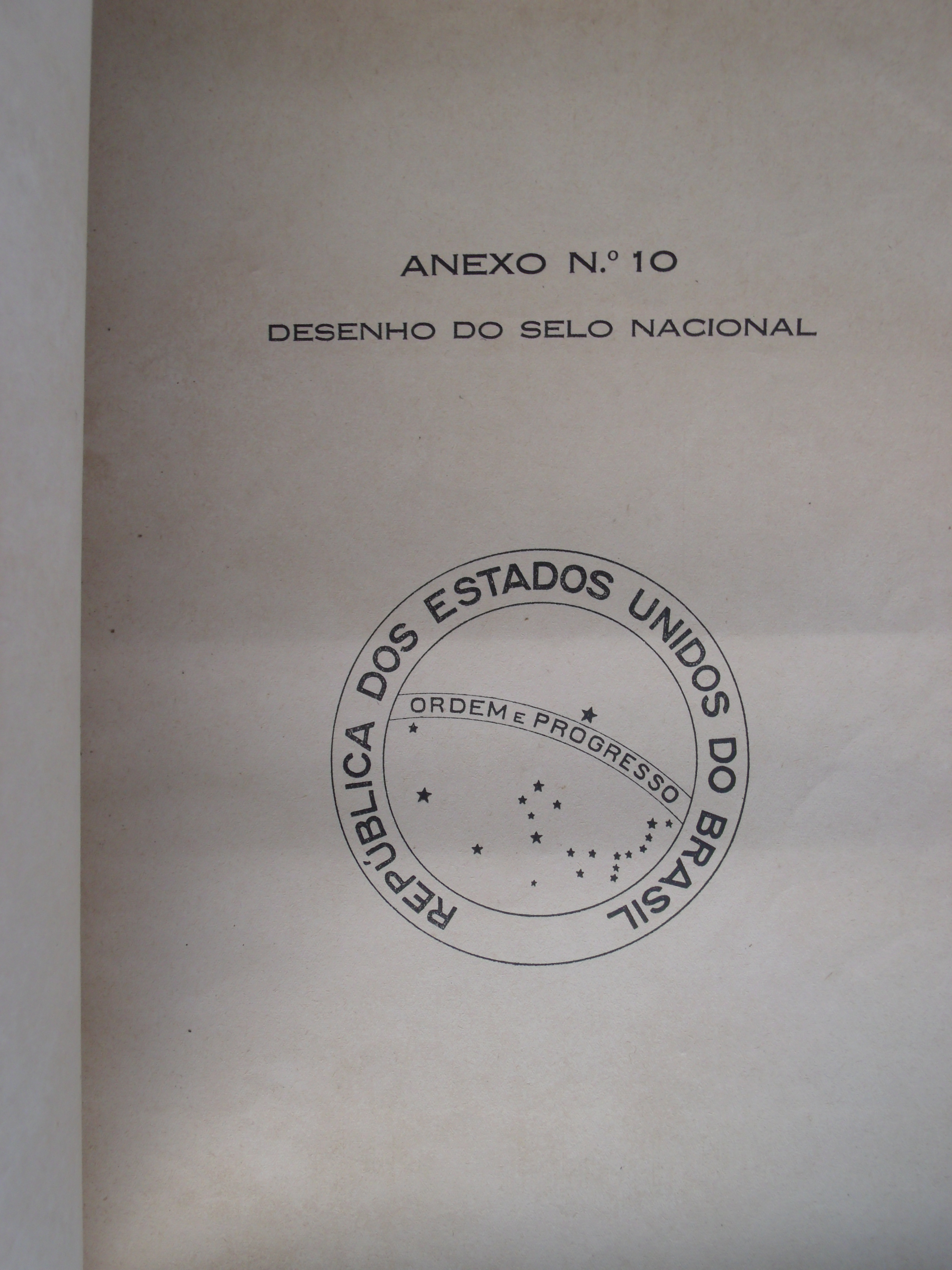 Selo Nacional do Brasil no anexo nº 10 do Decreto Lei 4.545, de 31 de julho de 1942.